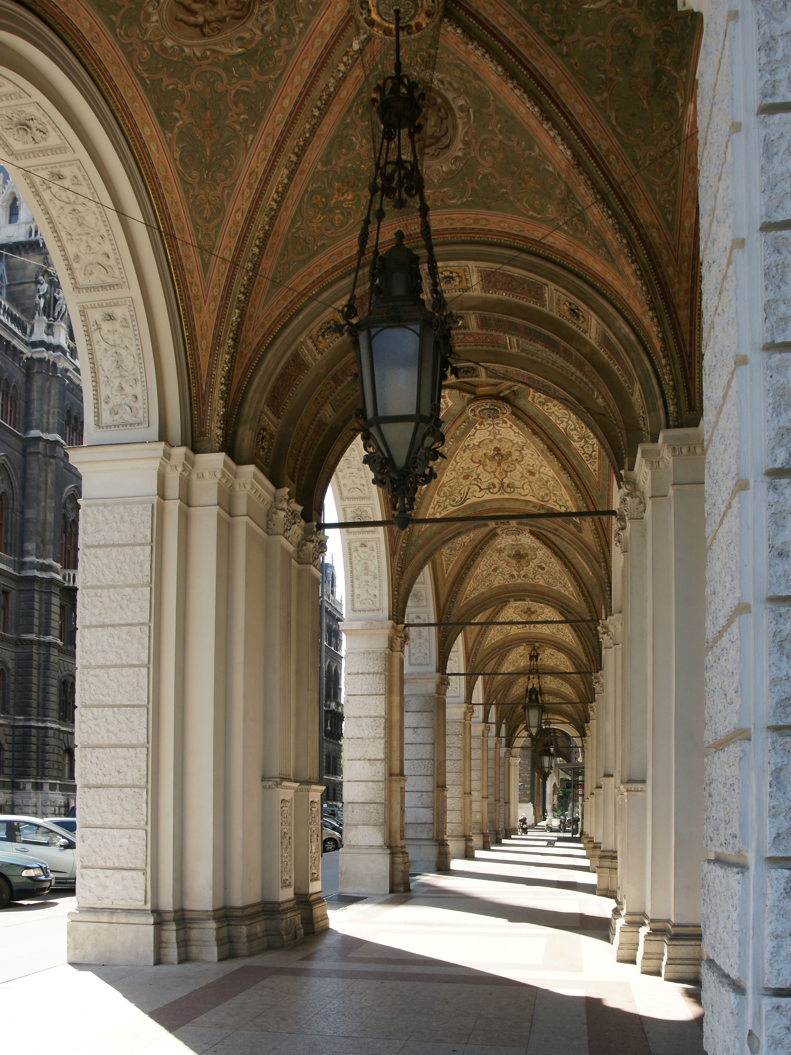 Arkaden in der Felderstraße (einer Seitenstraße vom Wiener Wiener Rathaus.